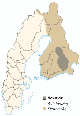 Savolax tartomány térképe